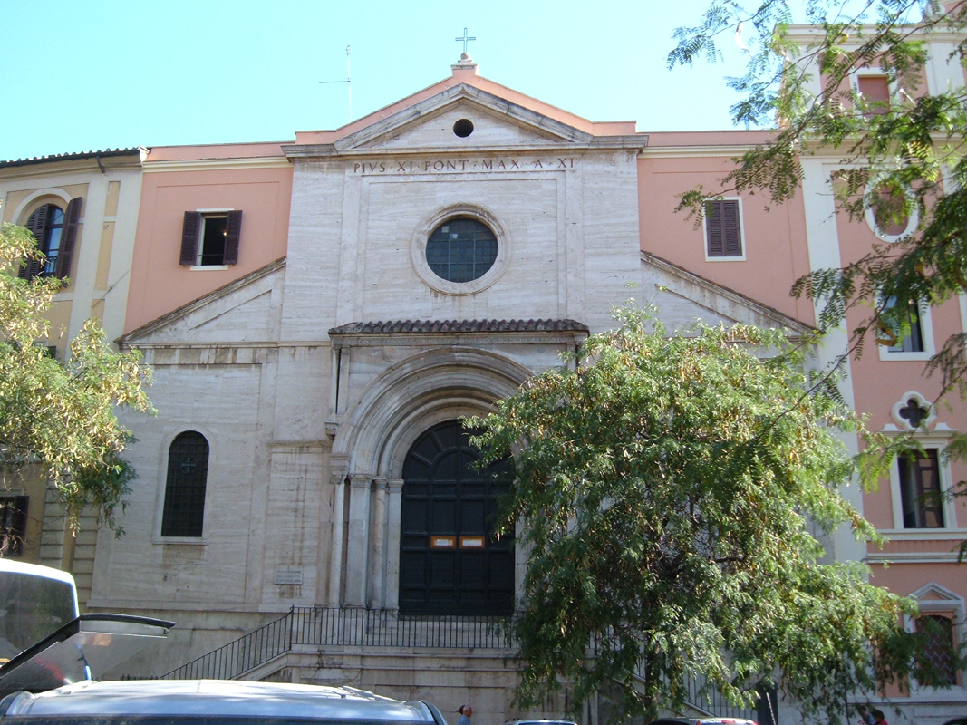 Chiesa di Sant'Antonio abate all'Esquilino, a Roma, nel rione Esquilino.